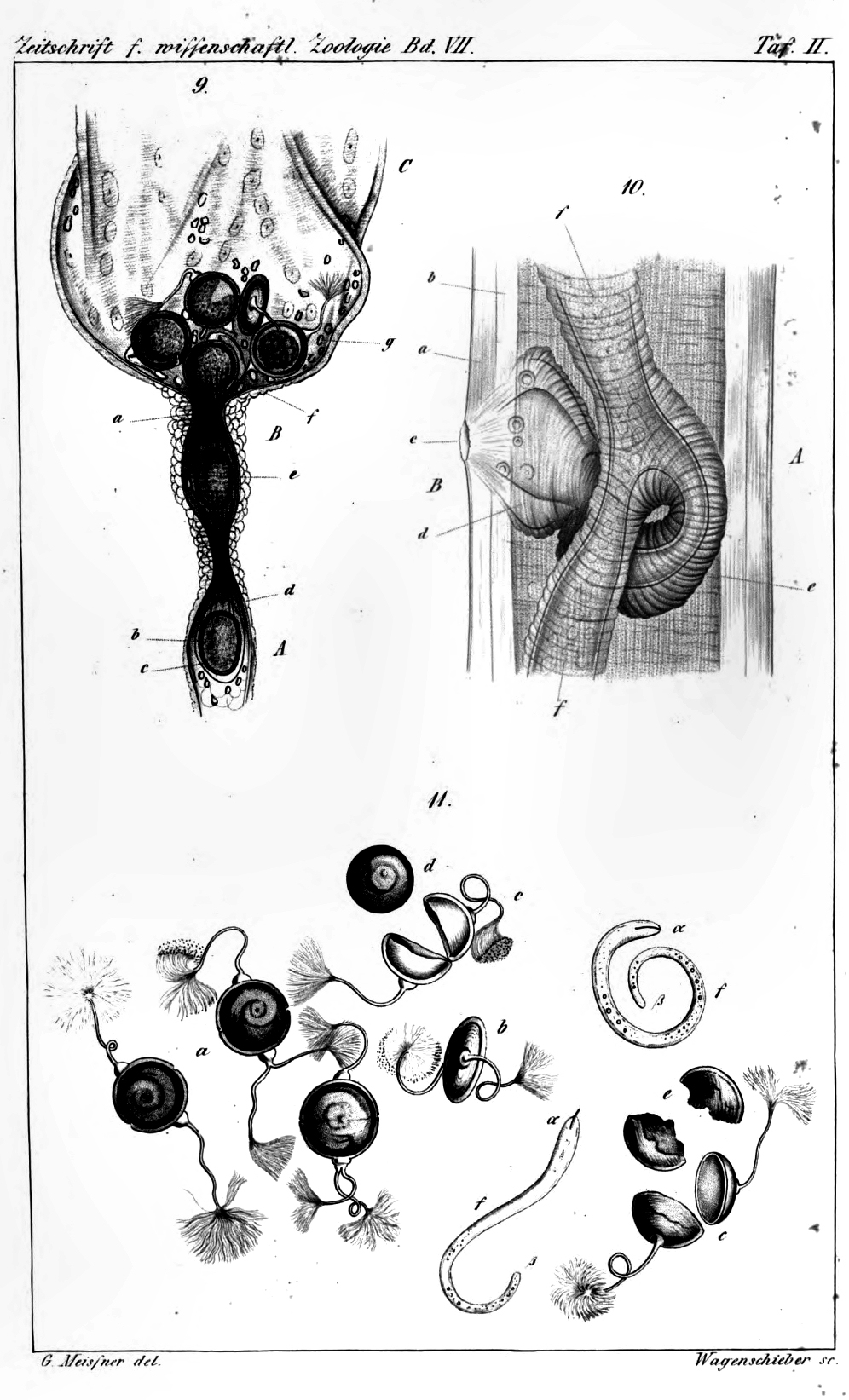 Mermis nigrescens, Fig.9. A End of ovary, B Uterine tube, C Beginning Uterus. Fig.10. uterus with ripe eggs; c=vulva, e=vagina, f=uterus Fig.11. eggs with bissi; Fig.9. A Ende des Eiweissschlauches ; B Tuba; C Anfang des Uterus; a Ringmuskeln der Tuba; b ein Ei vor dem Eintritt in die Tube; c Chorion desselben; d helle, weiche Schicht um dasselbe, aus welcher während des Durchgangs durch die Tuba die Schale mit den Chalazen Geformt wird; e ein Ei in der Tuba, welche hinter demselben eng zusammengeschnürt ist; f fertiges Ei, eben in den Uterus gelangend: g in der Fettmetamorphose begriffene Samenkörperchen. Fig.10. Mittlerer Leibesabschnitt mit der Vagina , von der Seite gesehen. A Rückenfläche; B Bauchfläche; a Corium; b Muskeln; c Vulva; d ringförmiger Wulst der Tunica propria der Vagina beim Uebergange in das Corium; warzenformige Verdickungen; e Vagina; f f die beiden Uteri. Fig.11. Reife Eier und Embryonen. a Reife Eier aus dem Uterus mit Chorion und Schale; an letzterer die Chalazen und eine im Aequator verlaufende Furche. Der Embryo ist bereits entwickelt; b ein Ei auf der Kante liegend (Linsenform); c c eine in der Furche klaffende Schale ; d das hervorgetretene Ei vom Chorion umgeben ; e unregelmässig geborstenes Chorion; f f künstlich herausgedrückte Embryonen; a Vorderende mit vorstreckbarem Stachel; l3 Schwanzende.